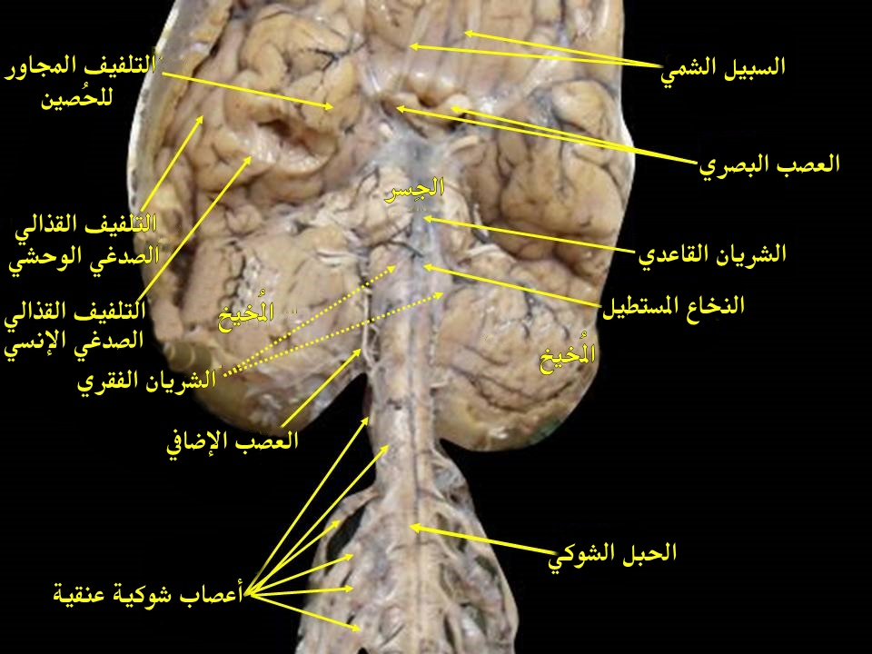 مشهد تشريحي